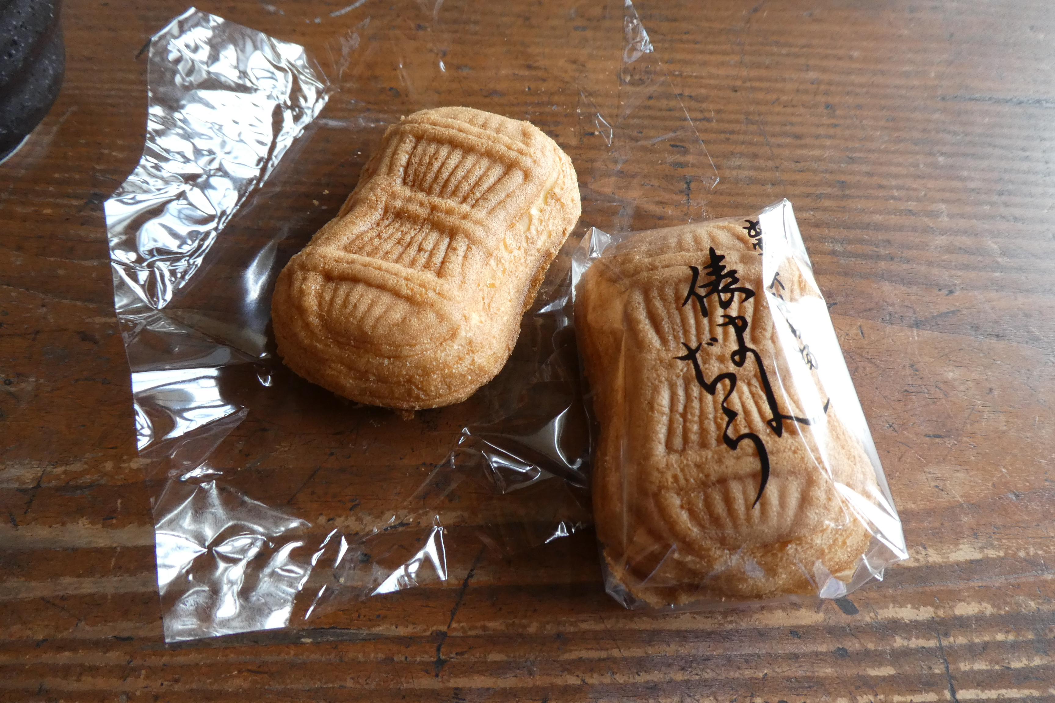 出雲大社名物 俵まんぢう。